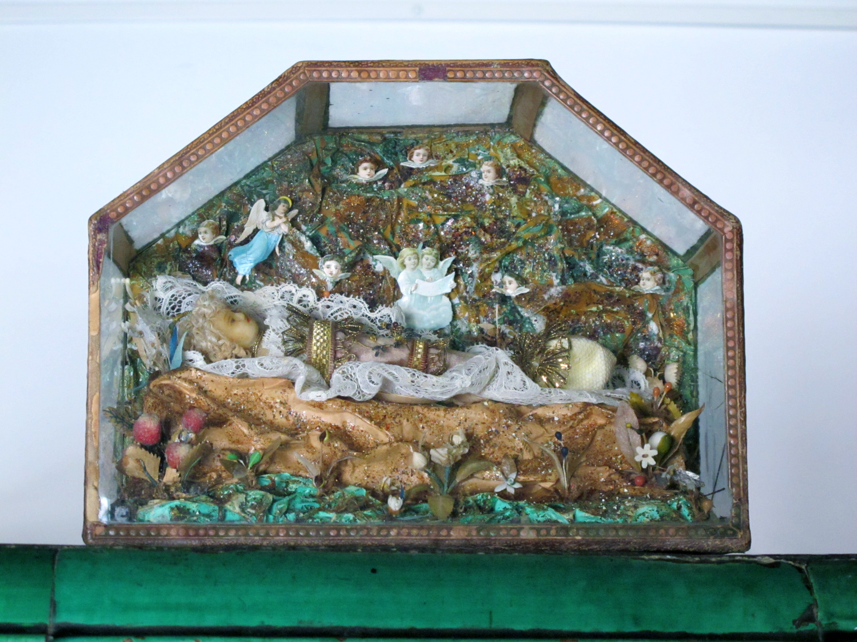 Dieses Objekt stammt aus der Krippen- und Fatschenkindsammlung der Sammlung Tobler im Museum zur Farb in Stäfa.